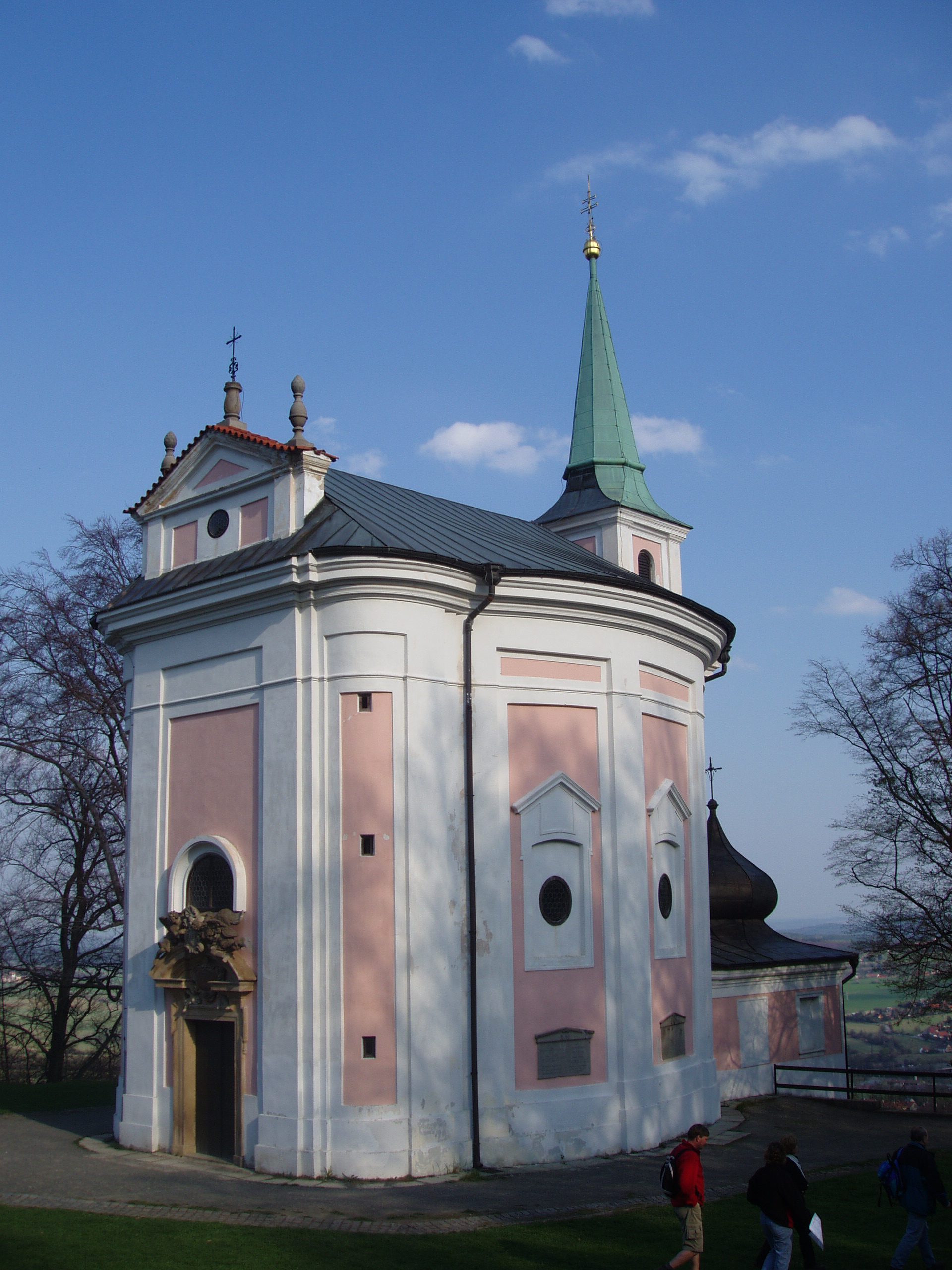 Kostelík svaté Máří Magdalény na Skalce u Mníšku pod Brdy